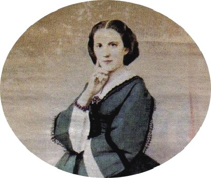 Elise Hansler, segunda esposa de D. Fernando II de Portugal.